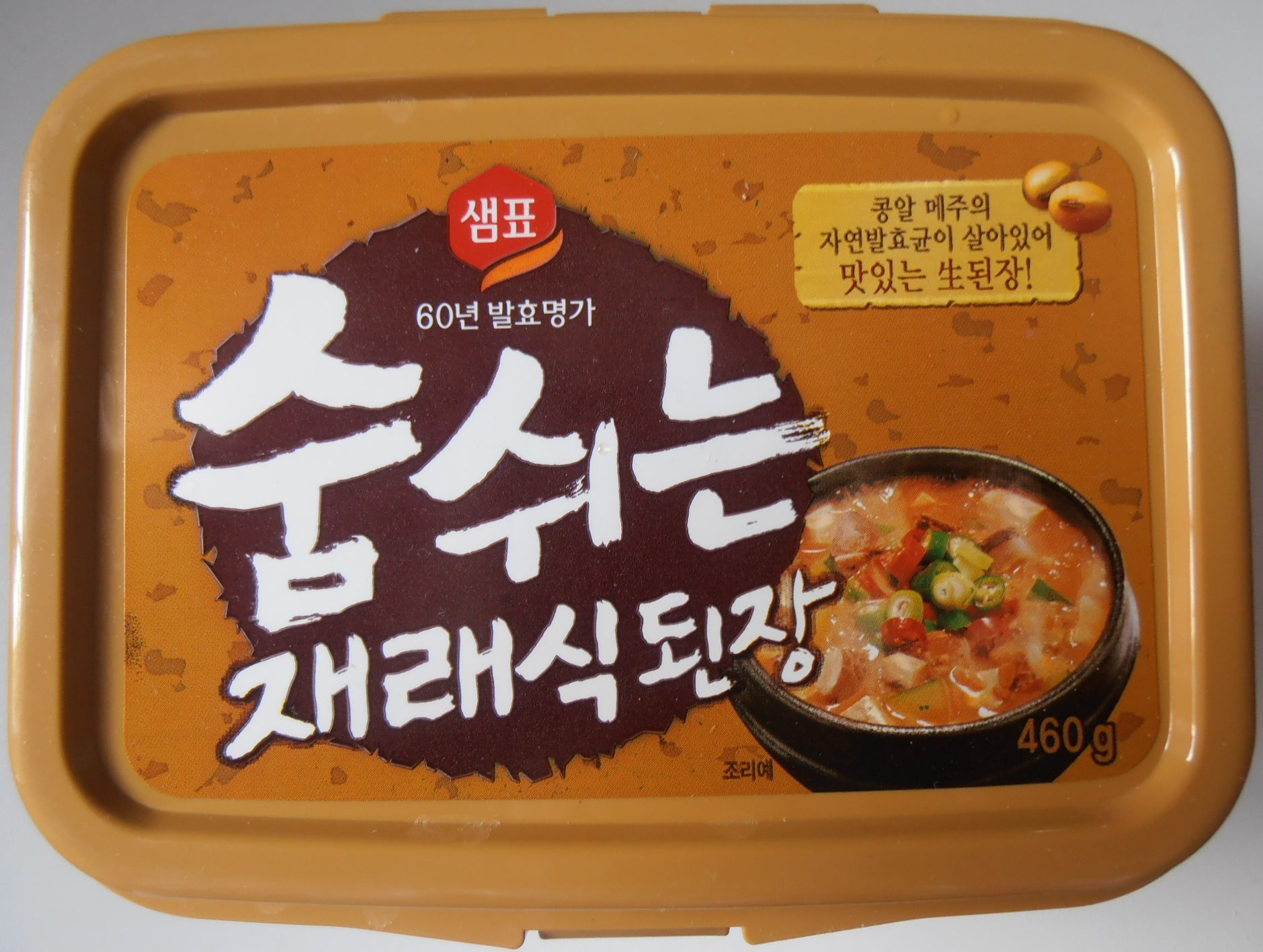 Doenjang (된장) bean paste